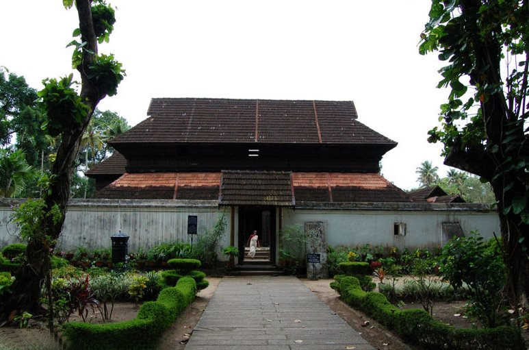 കൃഷ്ണപുരം കൊട്ടാരം, കായംകുളം.